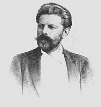 Czesław Jankowski (1857 - 1929) - polski poeta, krytyk, publicysta, historyk, krajoznawca, działacz społeczny.